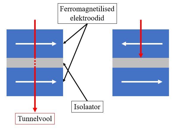 Tunnelmagnetotakistust kirjeldav lihtsustatud joonis, kus valged nooled näitavad ferromagnetite magneetumuse suundasid.